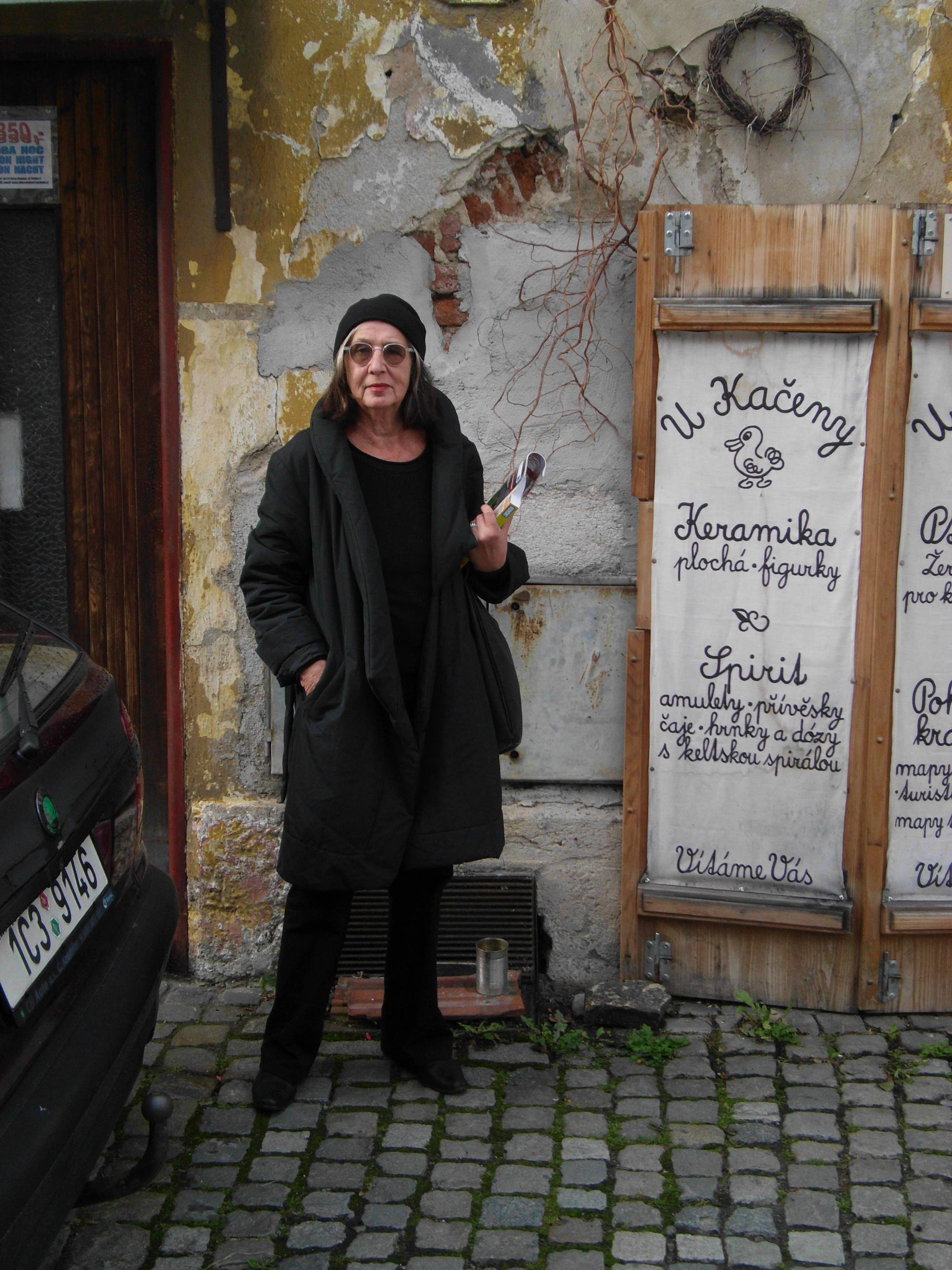 Gabriele Schmelz in Krumlov, Tschechien